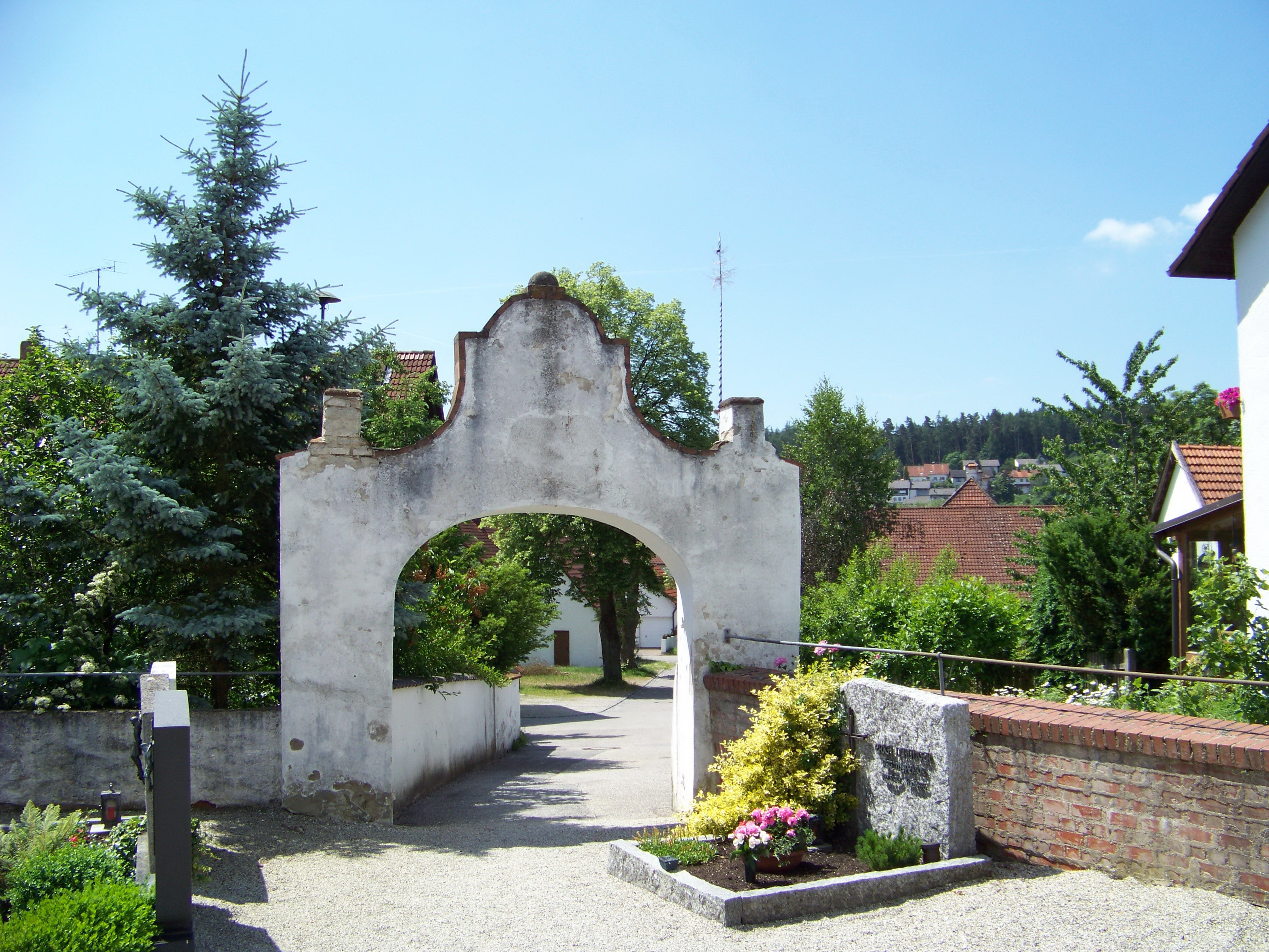 Altdorf bei Landshut. Pfettrach, Pfeffenhausener Straße 21. Katholische Filialkirche St. Othmar, Tor und Seelenhaus. Saalkirche mit eingezogenem Chor, um 1500. Barockisiert. Gliederung durch Strebepfeiler am Langhaus. Am Chor Dachfries und Dreieckslisenen. Nordseitig Chorflankenturm, mit Geschossgliederung und Blendbögen. Achtseitiger Aufsatz und Zwiebelkuppel barock. Barockes Friedhofstor mit Heiligenfigur.